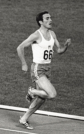 Andrzej Badeński, 400 m seminfinal, 1968 Olympics